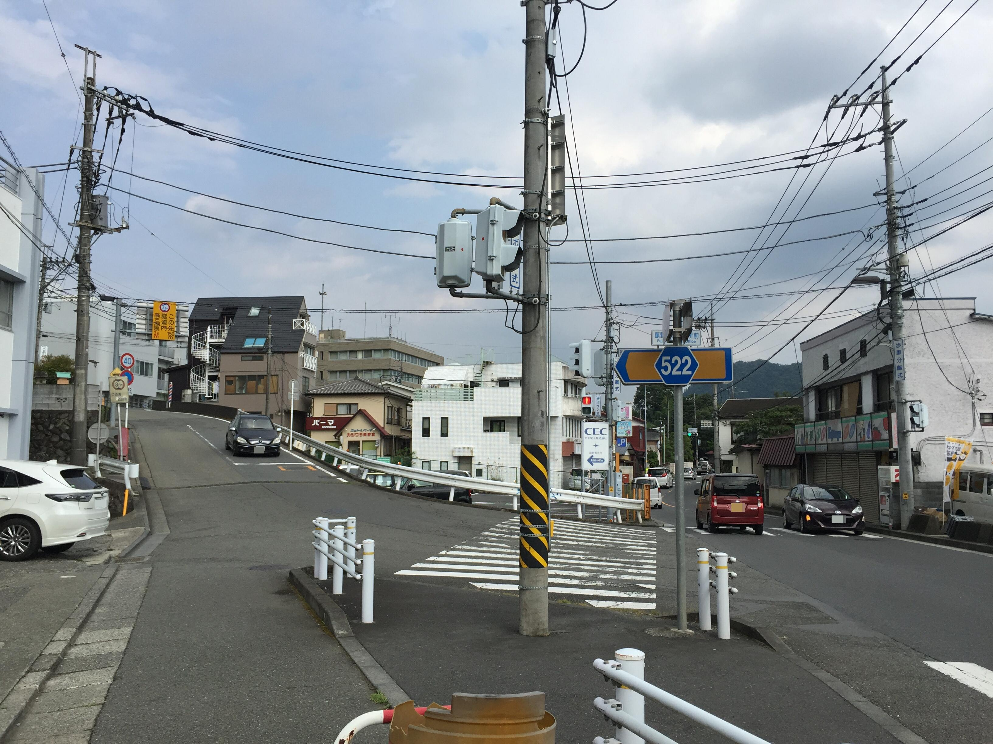 県道522号終点・藤野総合事務所前交差点。直進が国道20号・相模湖方面、左が522号・棡原方面。